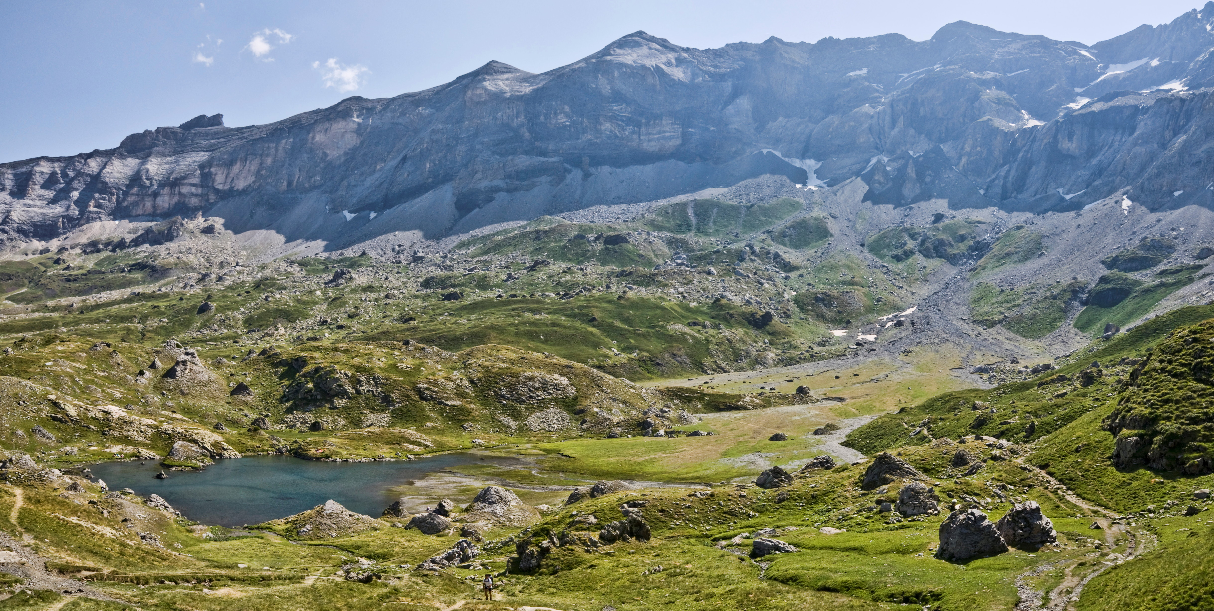 Cirque de Troumouse - Hautes Pyrénées - France